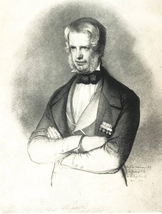 Porträt des Herzogs Leopold II. von Toscana (1797–1870)